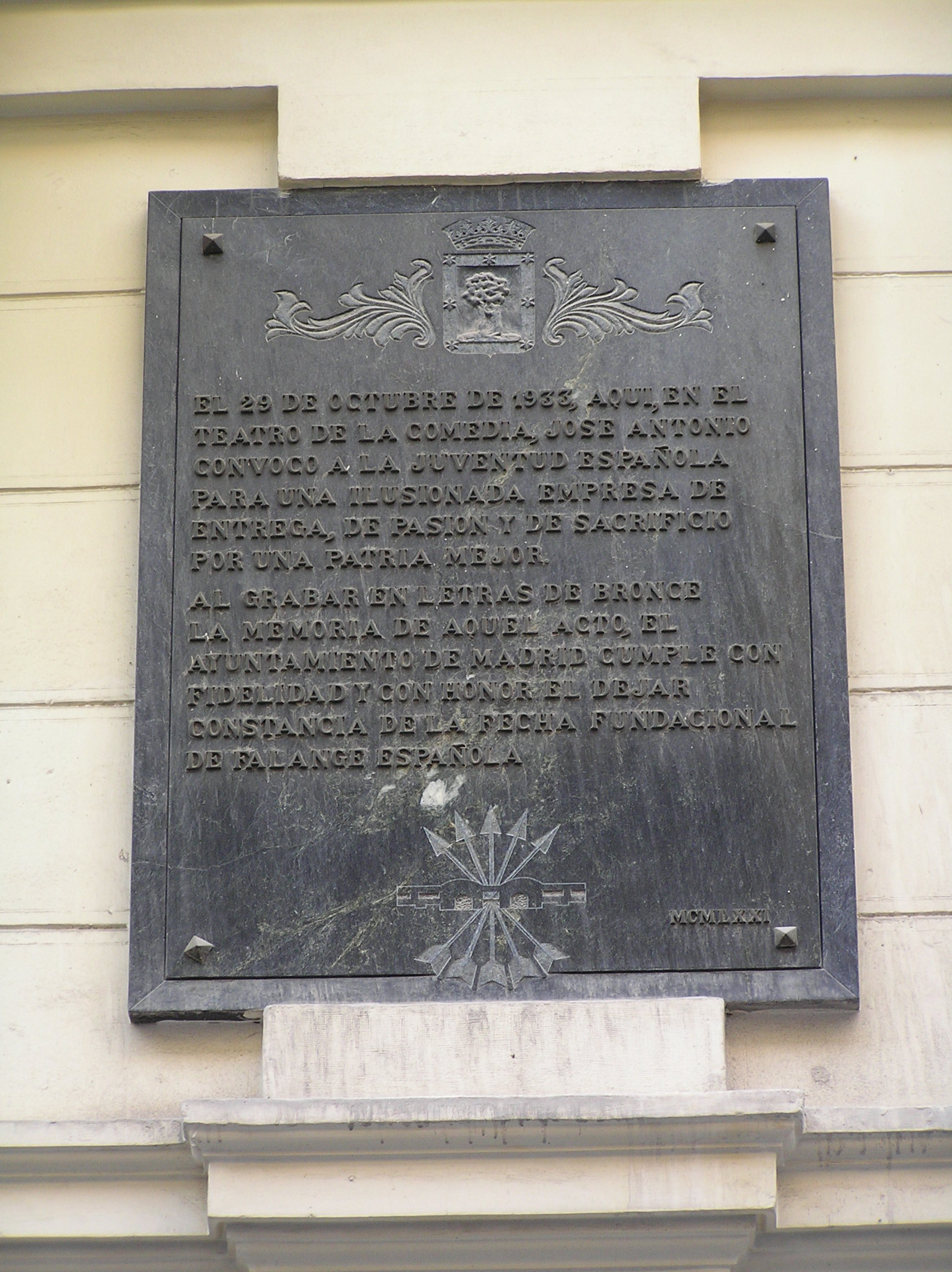 Placa en honor de José Antonio Primo de Rivera en la fachada del teatro de la Comedia de Madrid